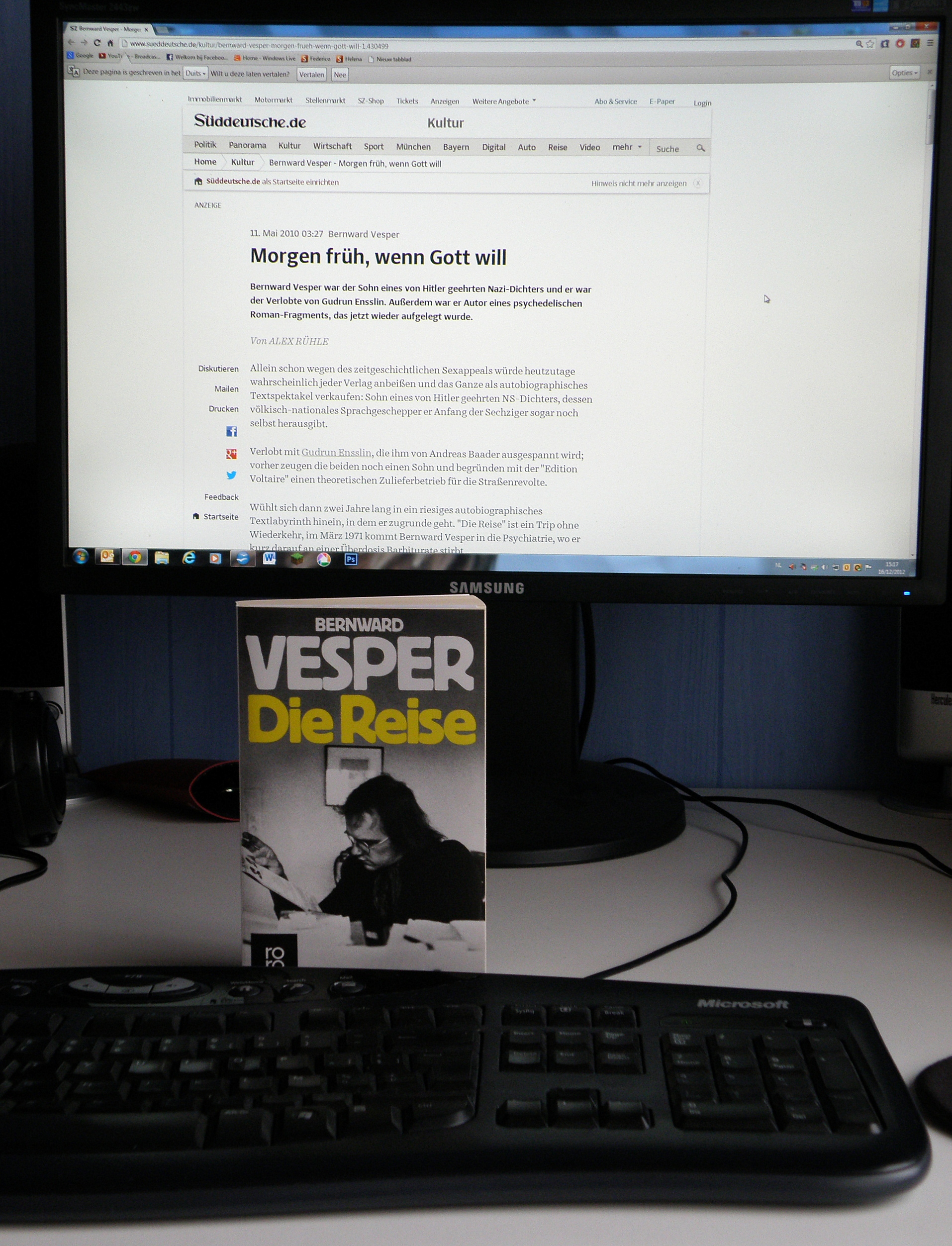 Composition Die Reise (B. Vesper, ed. Rororo) & art. Süddeutsche Zeitung.